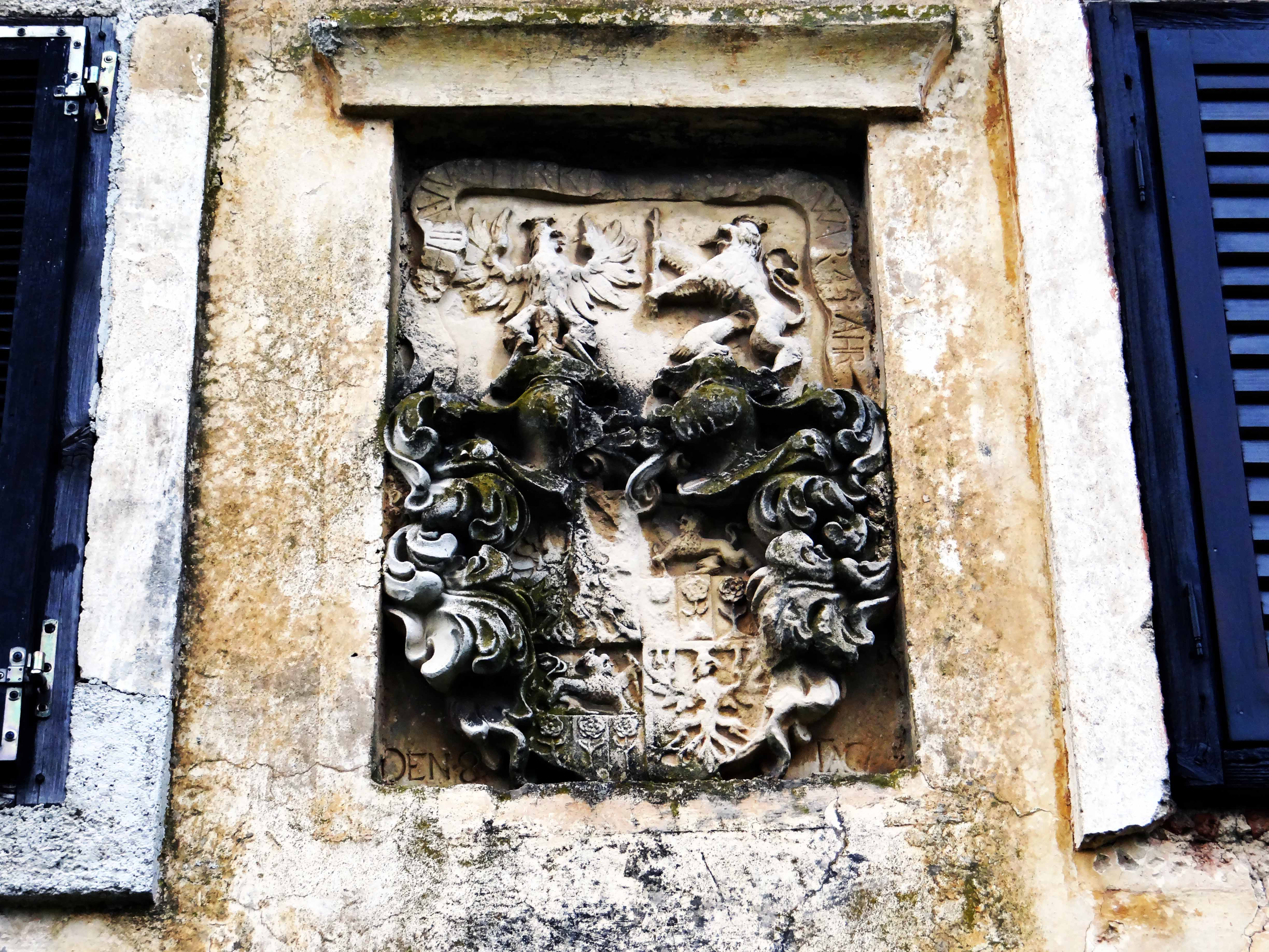 Dvorec Volavče (Wollautsche), Gorenje Mokro Polje